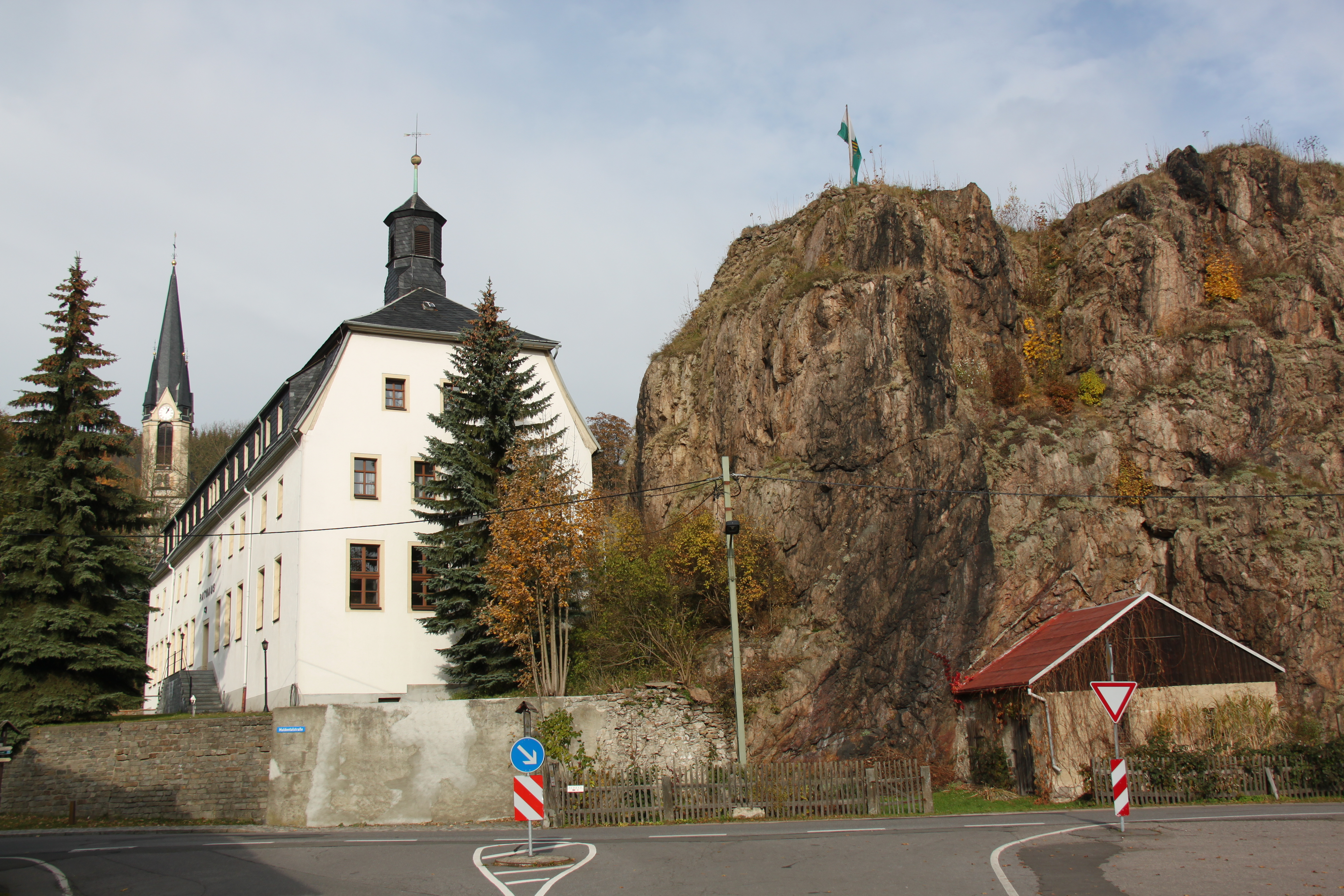 Ortskern von Rechenberg-Bienenmühle, links Kirche, Mitte Rathaus, rechts Bergsporn auf dem sich früher die Burg Rechenberg befand